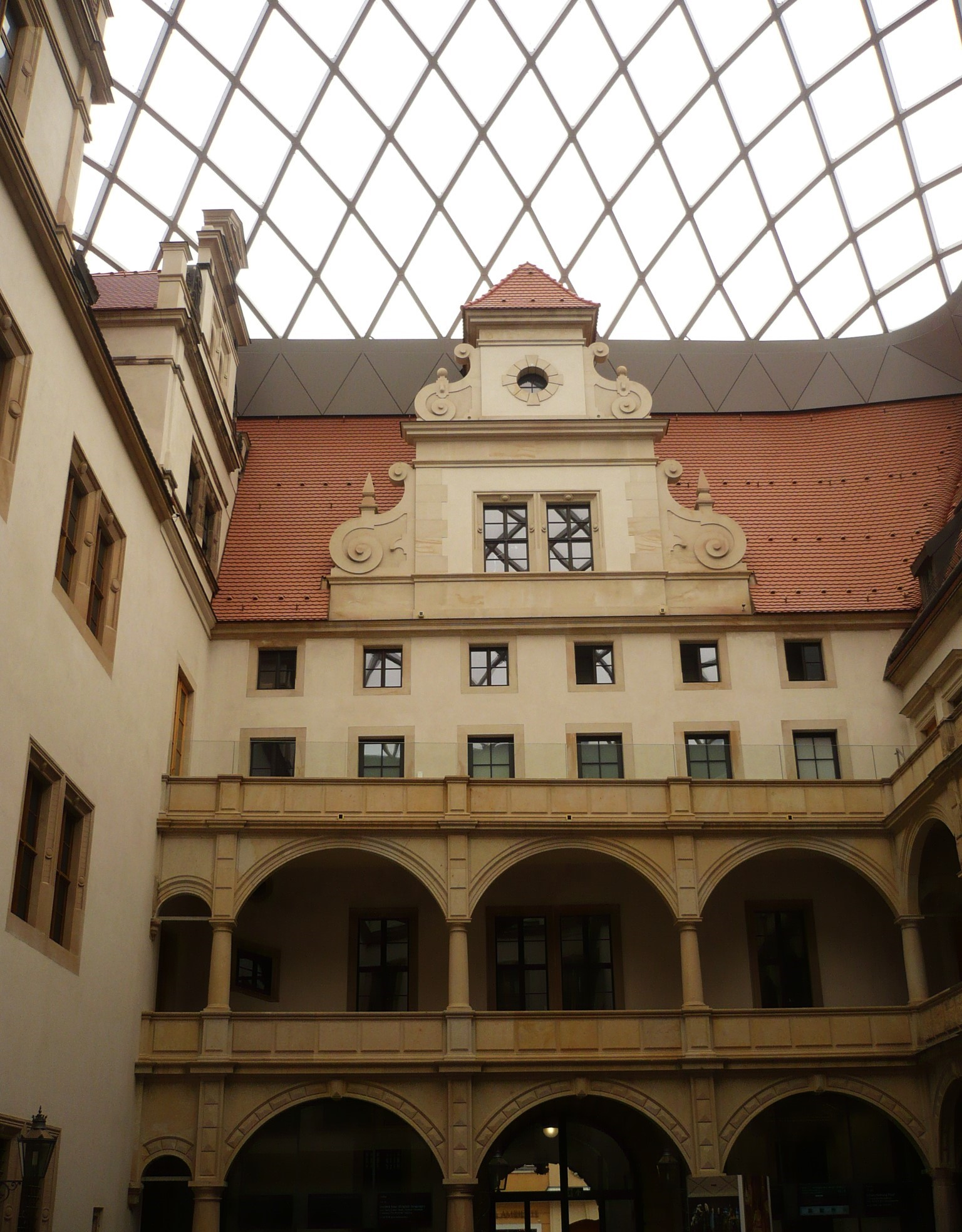 Drezno.Zamek